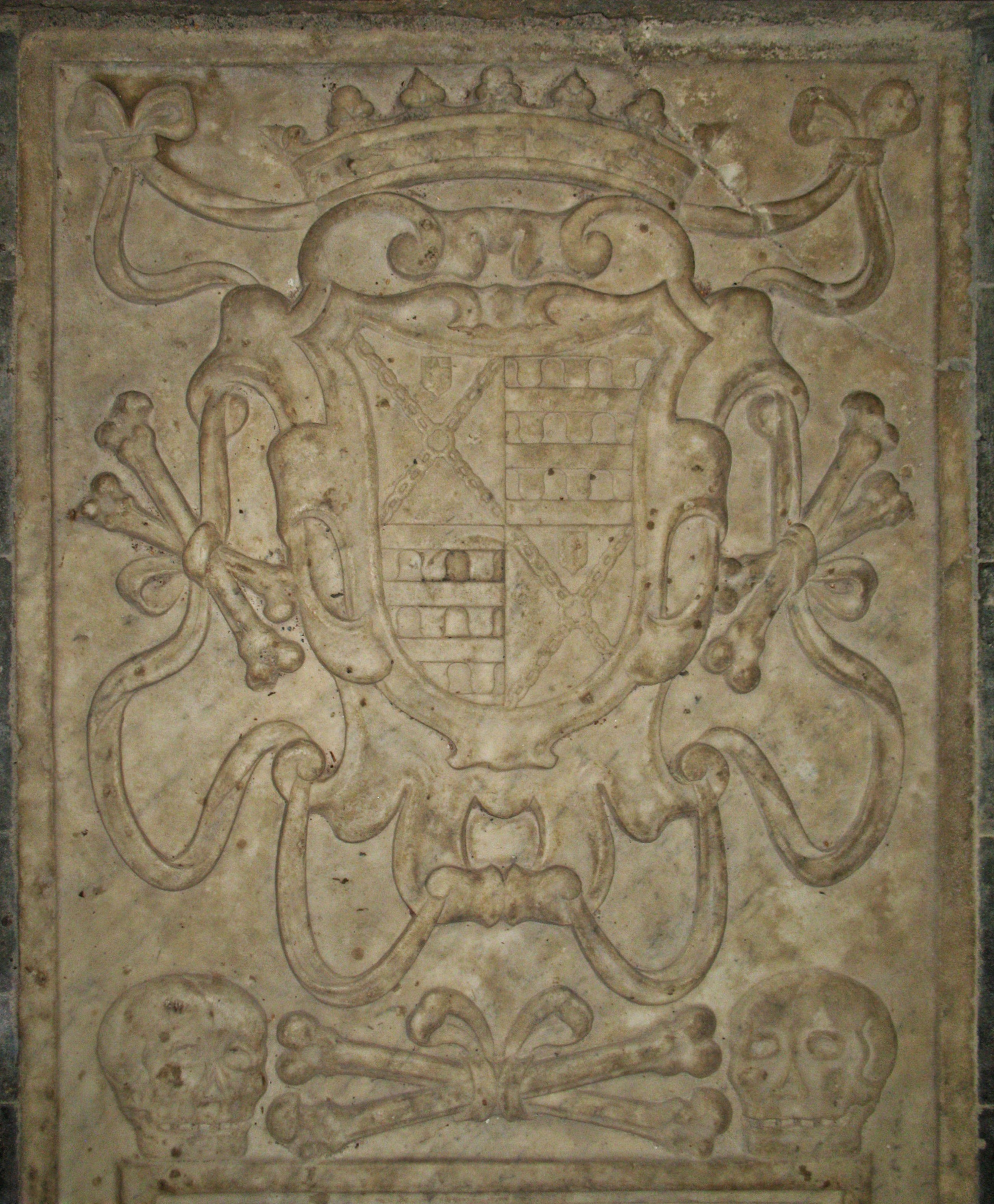 Pentedattilo, lapide tombale posta all'interno della chiesa di San Pietro Apostolo, particolare stemma